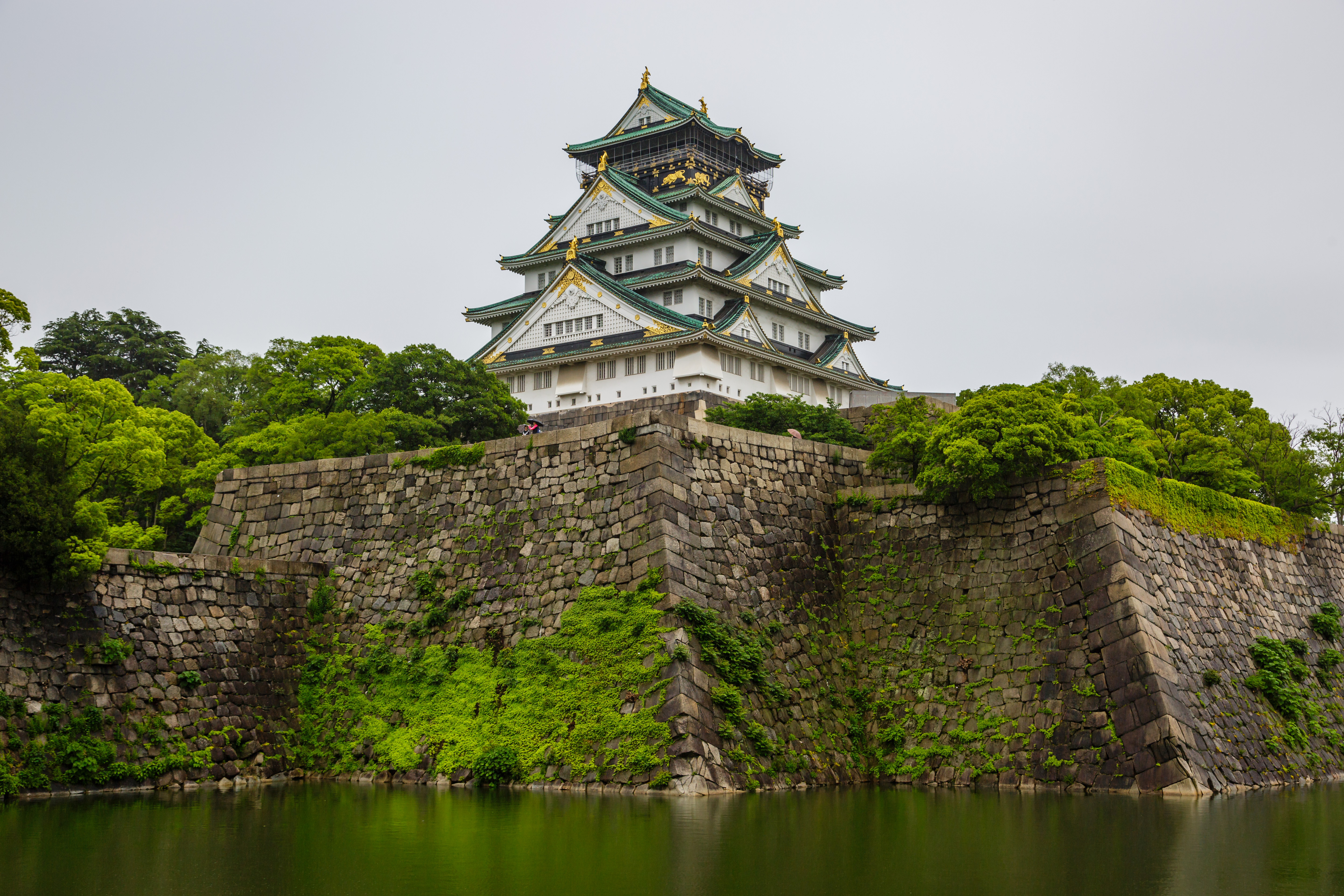 Osaka Castle in Osaka, Japan